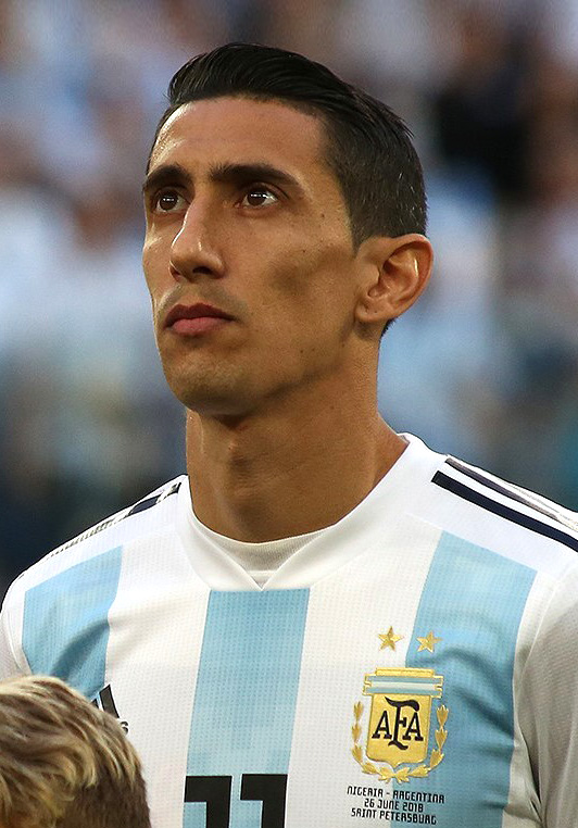 Гол Рохо в концовке выводит Аргентину в плей-офф чемпионата мира